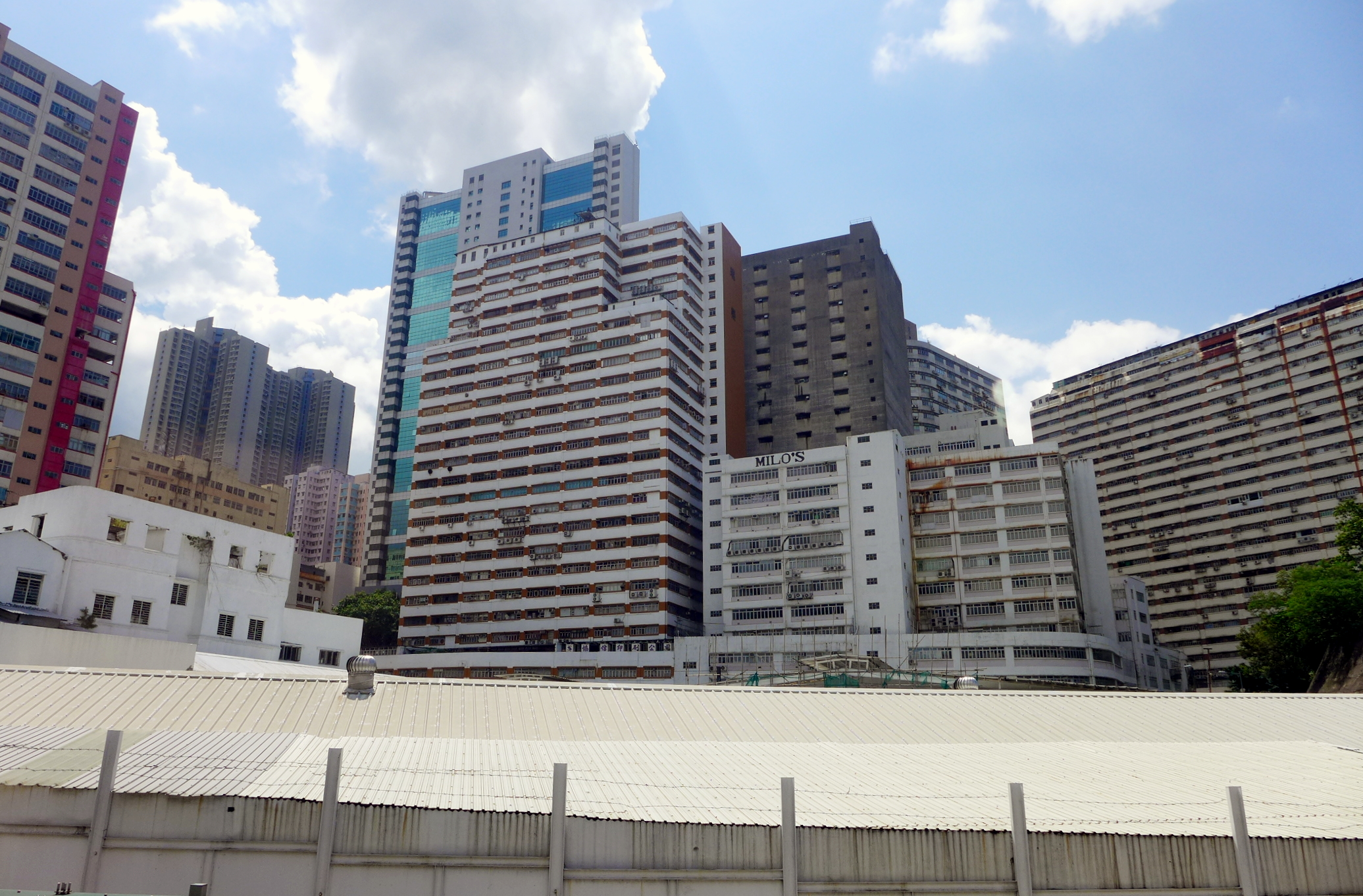 Chung Kwai Chung Industrial Buildings